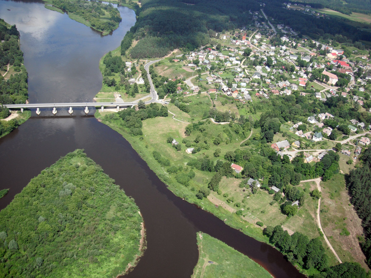 Merkinės panorama